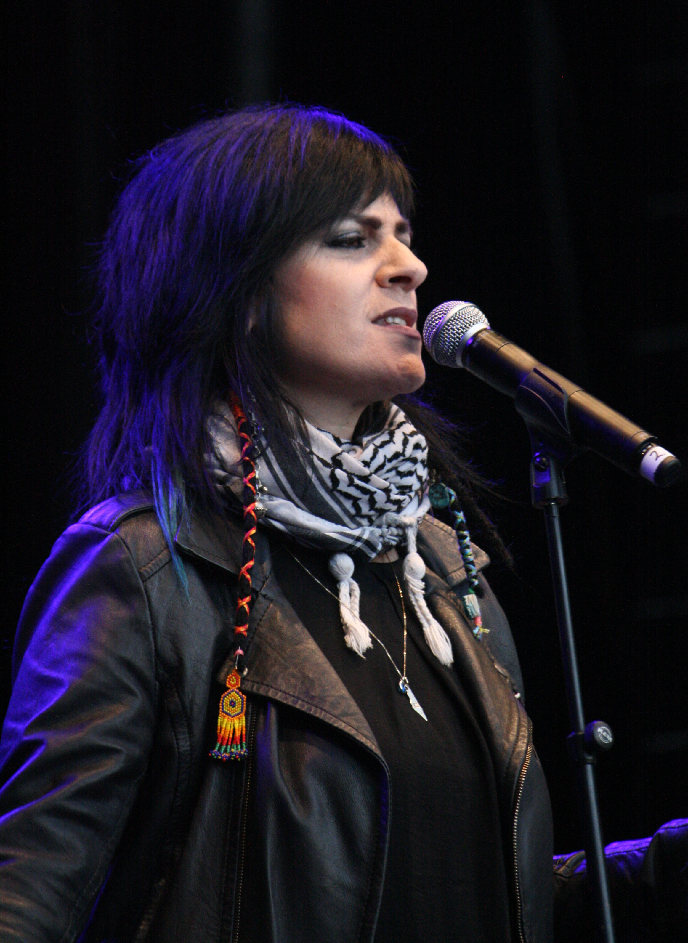 Musikk for Gaza, Oslo 3.9.2014